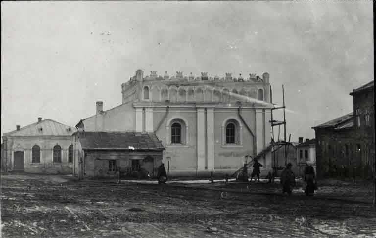 Стара синагога в Сокалю, біля неї ще одна - Бейт-мідраш.